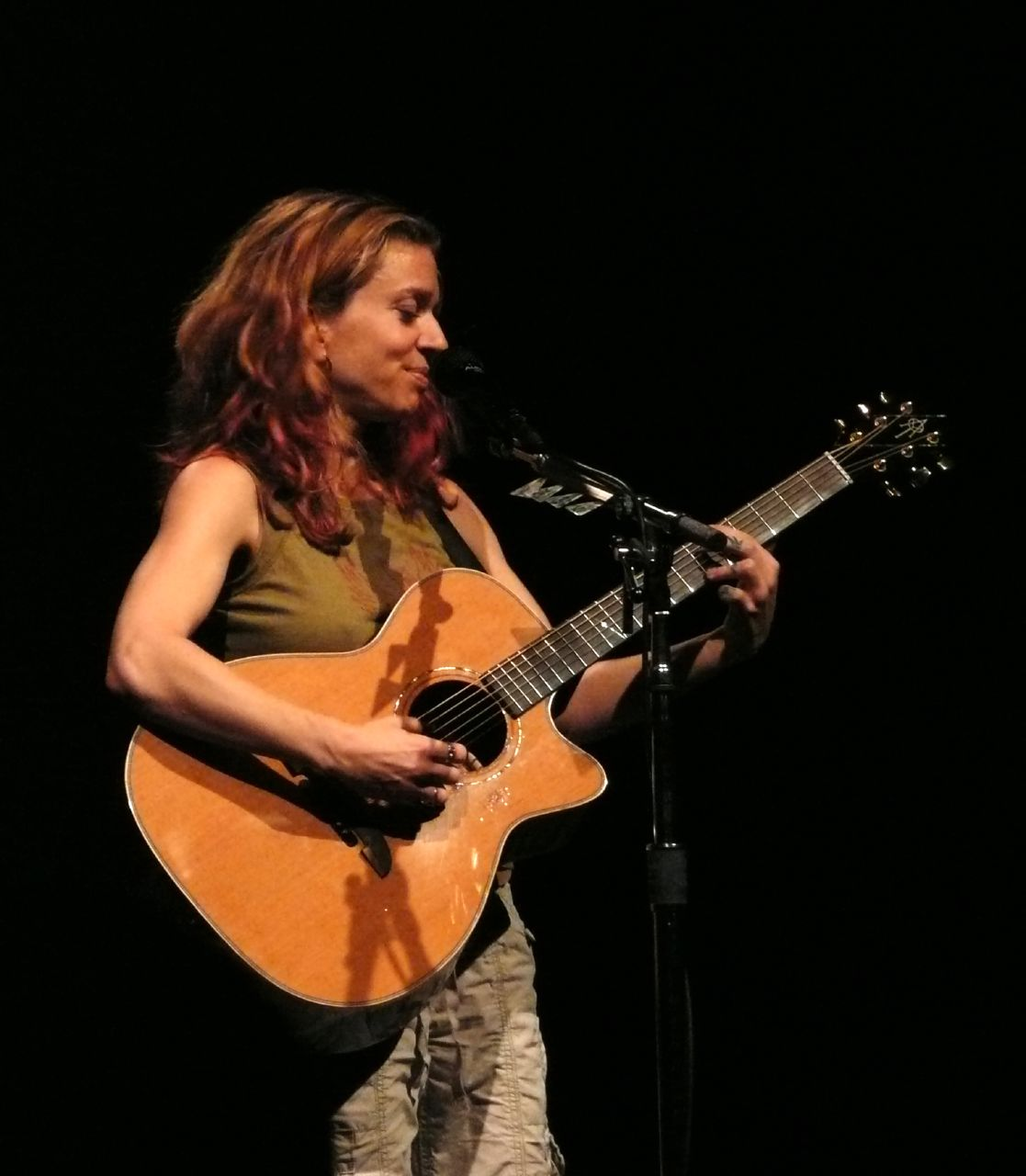 Ani Difranco at Ancienne Belgique on October, 11, 2007.